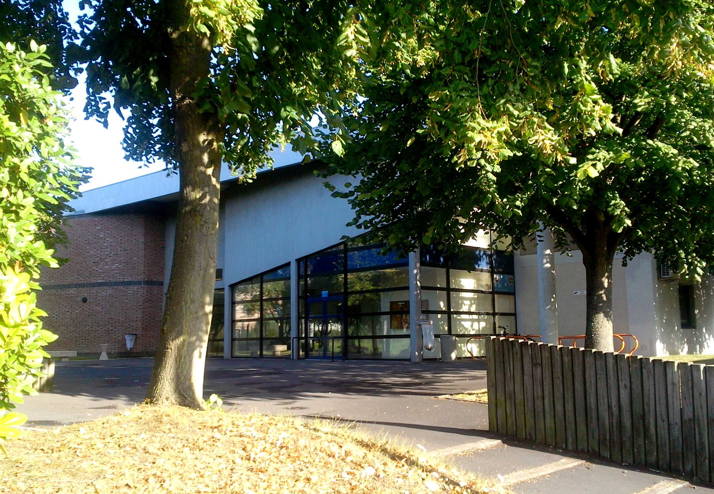 Le bâtiment de l'ANRT Lille sur le campus Pont de Bois de l'université Lille III à Villeneuve d'Ascq.